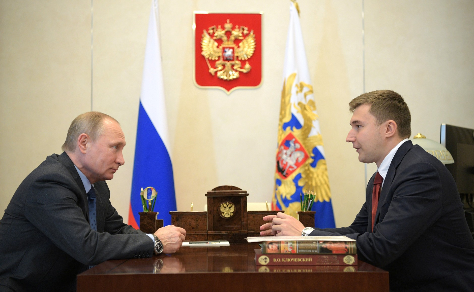 Встреча Президента России Владимира Путина с шахматистом Сергеем Карякиным